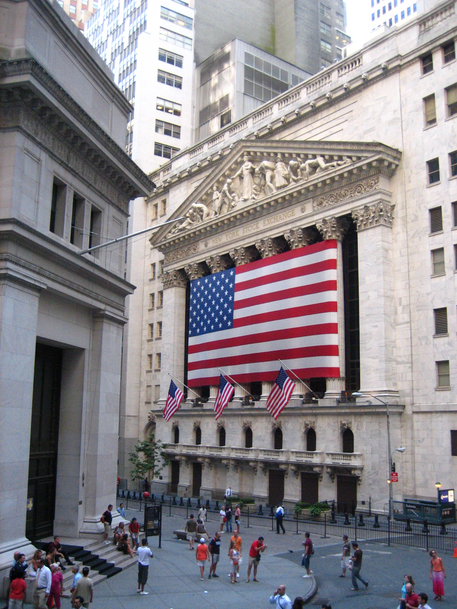 NYSE